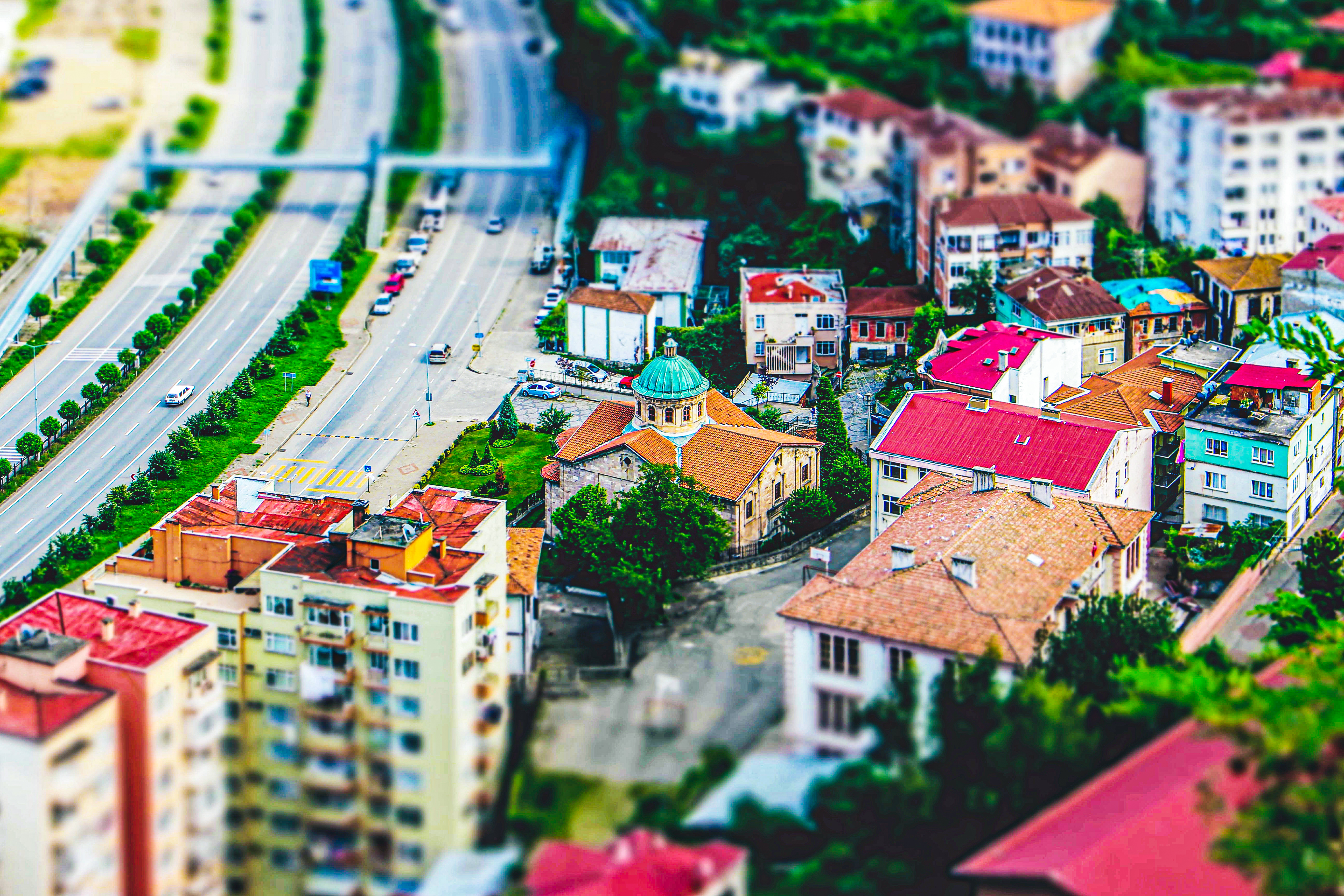 Giresun Arkeoloji Müzesine kaleden bakış. Blick auf das Archäologische Museum Giresun von der Festung aus. View of the Giresun Archaeological Museum from the castle.